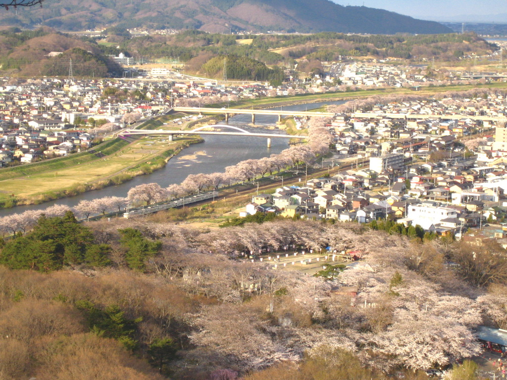 "Sakura" View from Funaoka Castle Park.